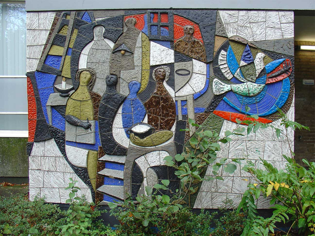 Zonder titel (keramiek, reliëf, 1965) door Cor Dam - De Rijkestraat Gouda